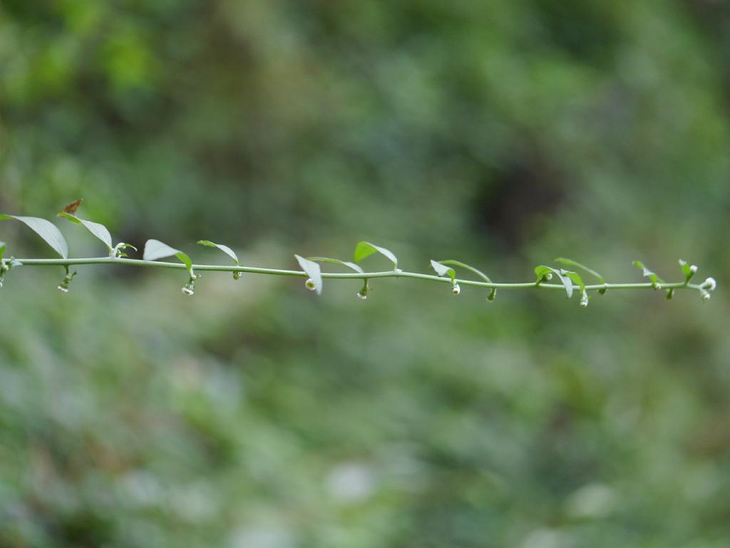 Aster vertucilatus：シュウブンソウ 2014/09/15 和歌山県田辺市：Tanabe City. Wakayama Pref. Japan